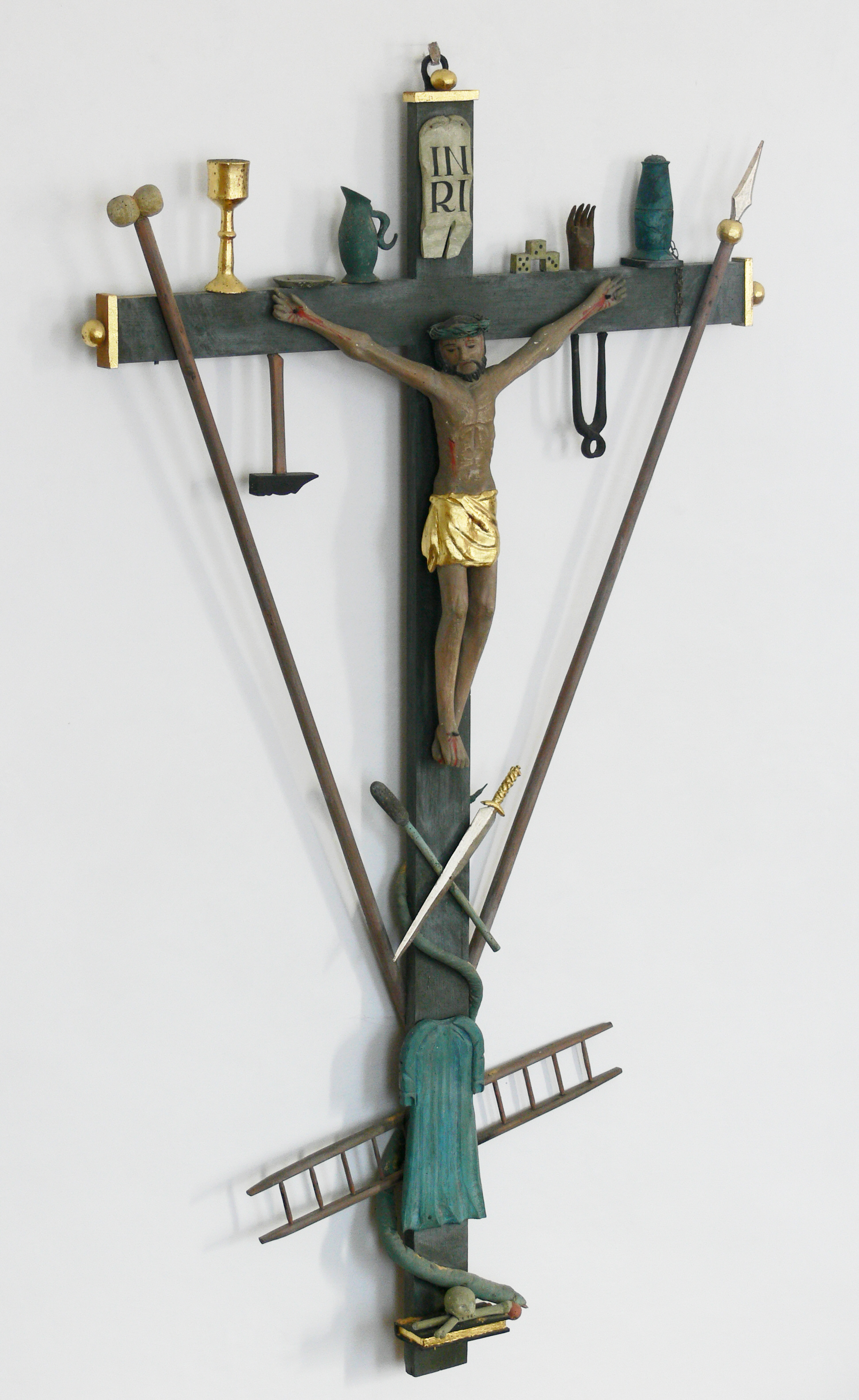 Kapelle St. Wendelin, Bremenried, Weiler-Simmerberg (Landkreis Lindau, Bayern); geweiht als Kapelle eines Leprosiums am 19. Oktober 1717 Arma-Christi-Kruzifix